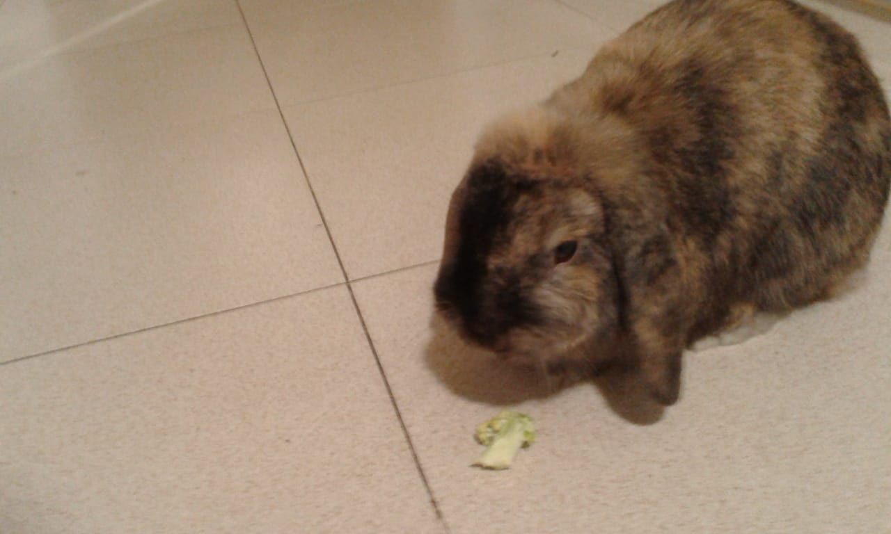 Conill domèstic. És el nostre conill de companyia. Es considera un conill nan.